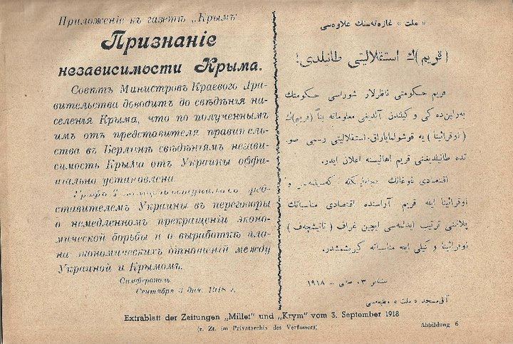 Признание Верховной Радой независимости Крыма. Приложение к газете Крым, 3 сентября 1918 года